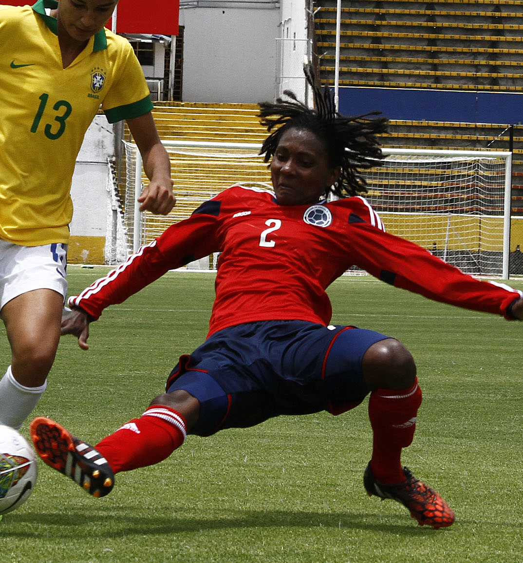 Quito, 28 sep (Andes).- La selección brasileña femenina de fútbol se proclamó Campeona de la Copa América de Fútbol Ecuador 2014. Foto: Micaela Ayala V./Andes